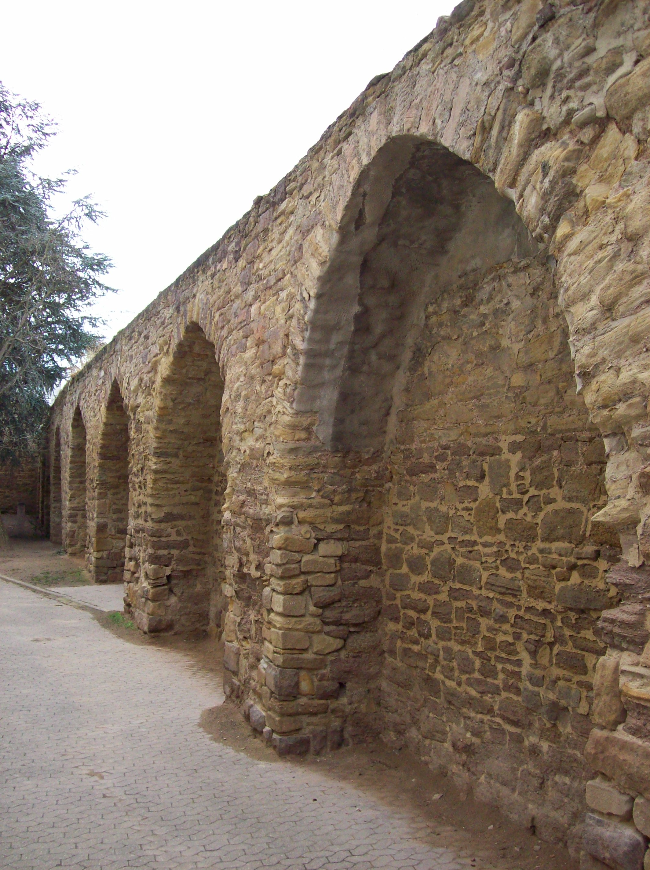 Historische Stadtmauer Bad Kreuznach, Teilstück im Gymnasialgarten